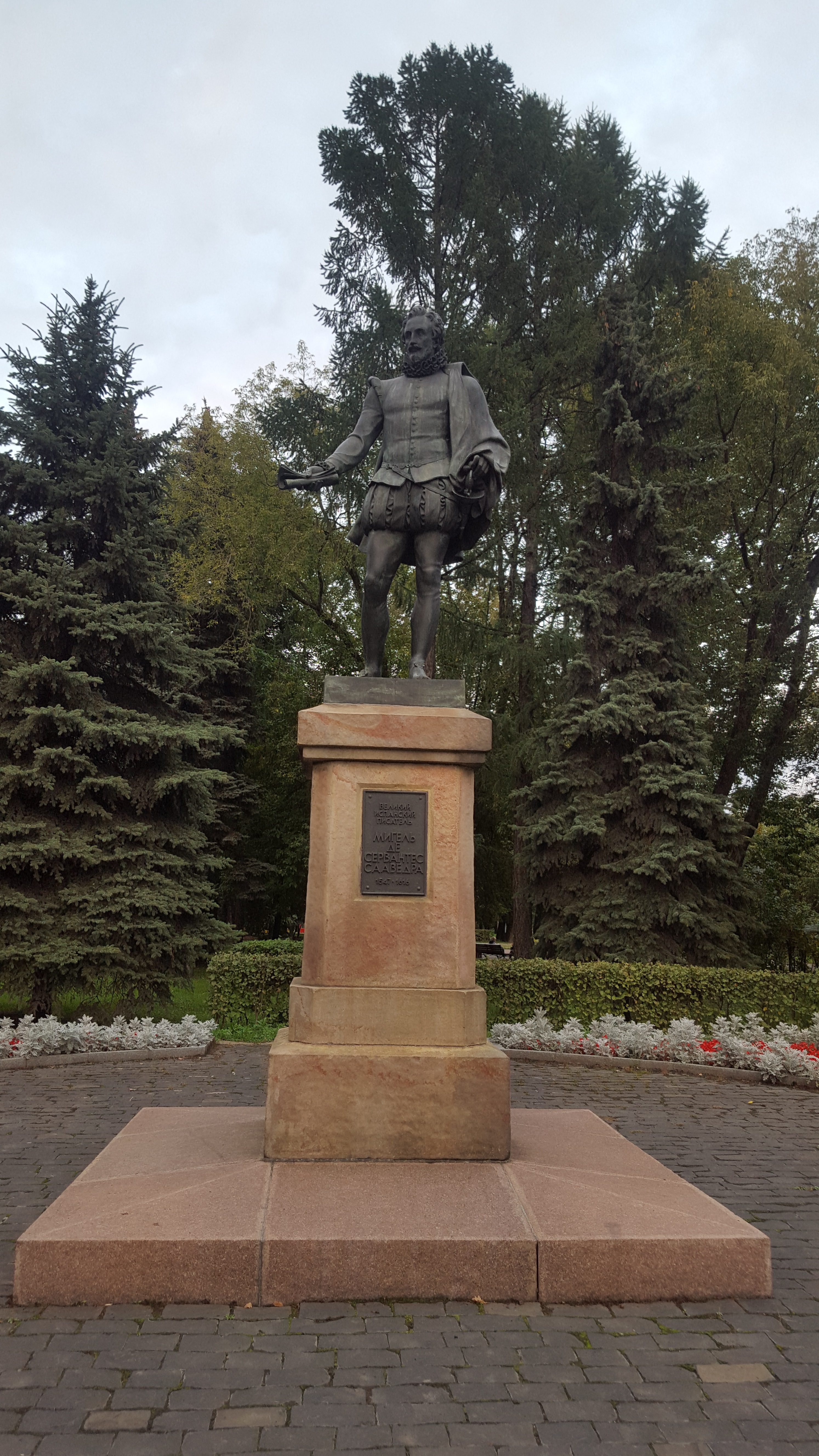 Памятник Мигелю де Сервантесу: Парк Дружбы, Левобережный, Северный округ, Москва